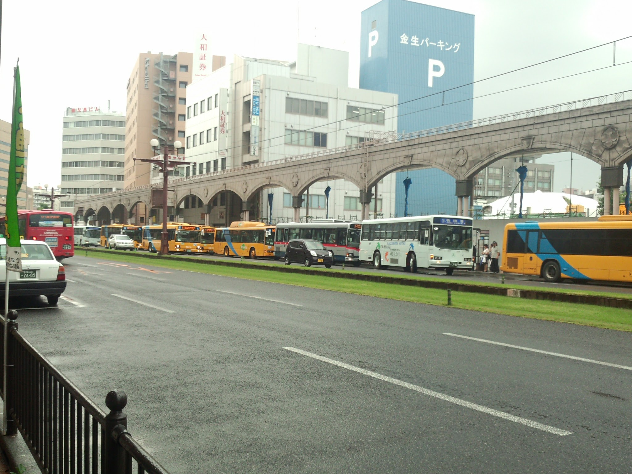 過剰な台数が集中する鹿児島市の金生町バス停 （2017-0731-18:38頃）